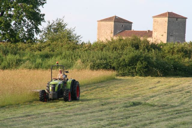 Le Chateau de Floressas en Juin 2008